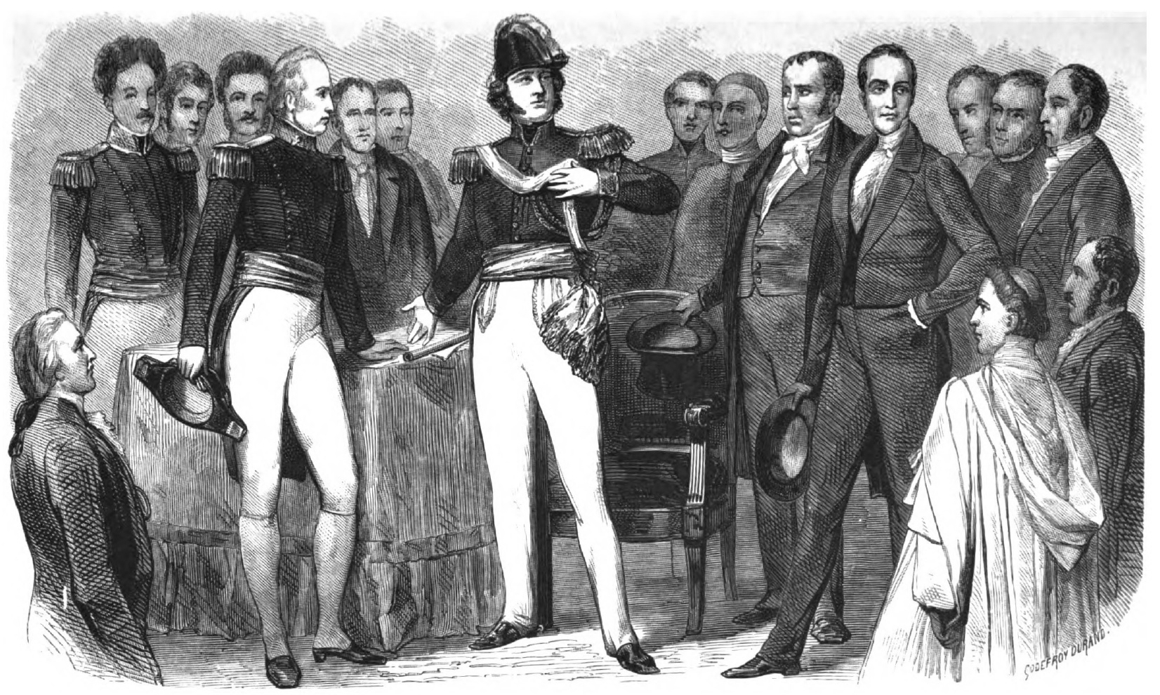 Abdicación de Bernardo O'Higgins Riquelme. Bernardo O'Higgins (Chillán, Capitanía General de Chile, 20 de agosto de 1778-Lima, Perú, 24 de octubre de 1842) fue un militar y político chileno reconocido como uno de los «padres de la Patria de Chile» por su participación crucial en el proceso de independencia del Imperio español, tanto en la respectiva guerra como en el cargo de director supremo entre 1817 y 1823, en el que consolidó su inicio como nación. Imagen del libro “El ostracismo del General D. Bernardo O'Higgins” editado en 1860, cuyo copyright a expirado, pasando al dominio publico